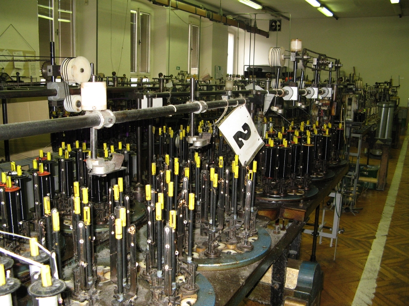 Textilní továrna Weiss a Rössler (Vrbno pod Pradědem), Vrbno pod Pradědem